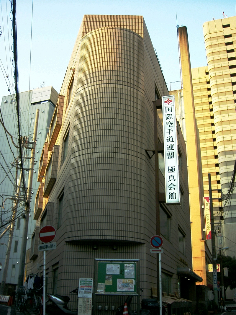 “Kyokushin-Kaikan_Tokyo_headquarters”Japan